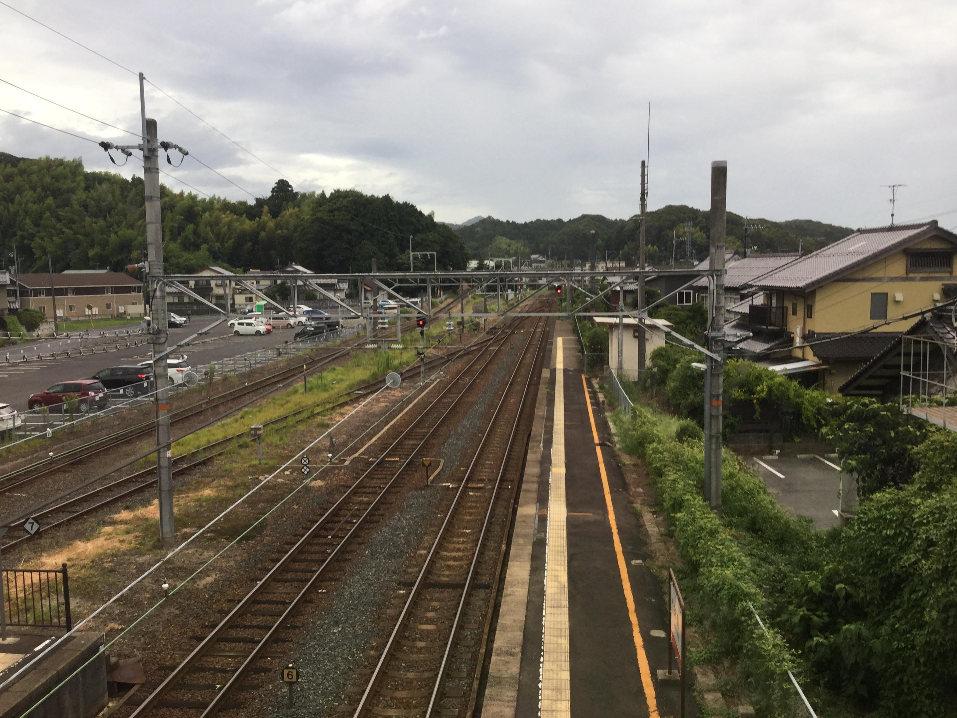 Shinji Station (宍道駅)